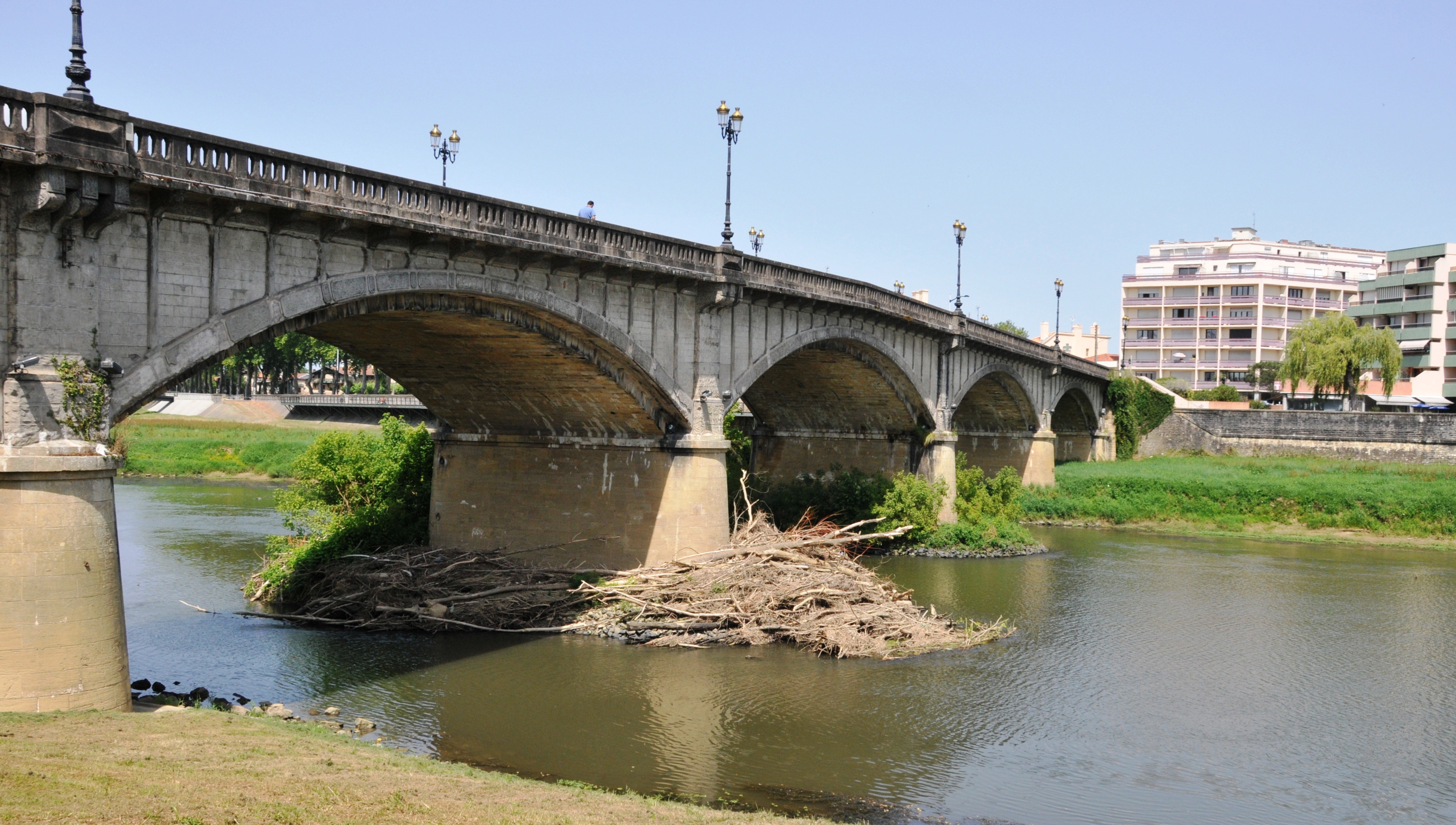 Dax, Adourbrücke